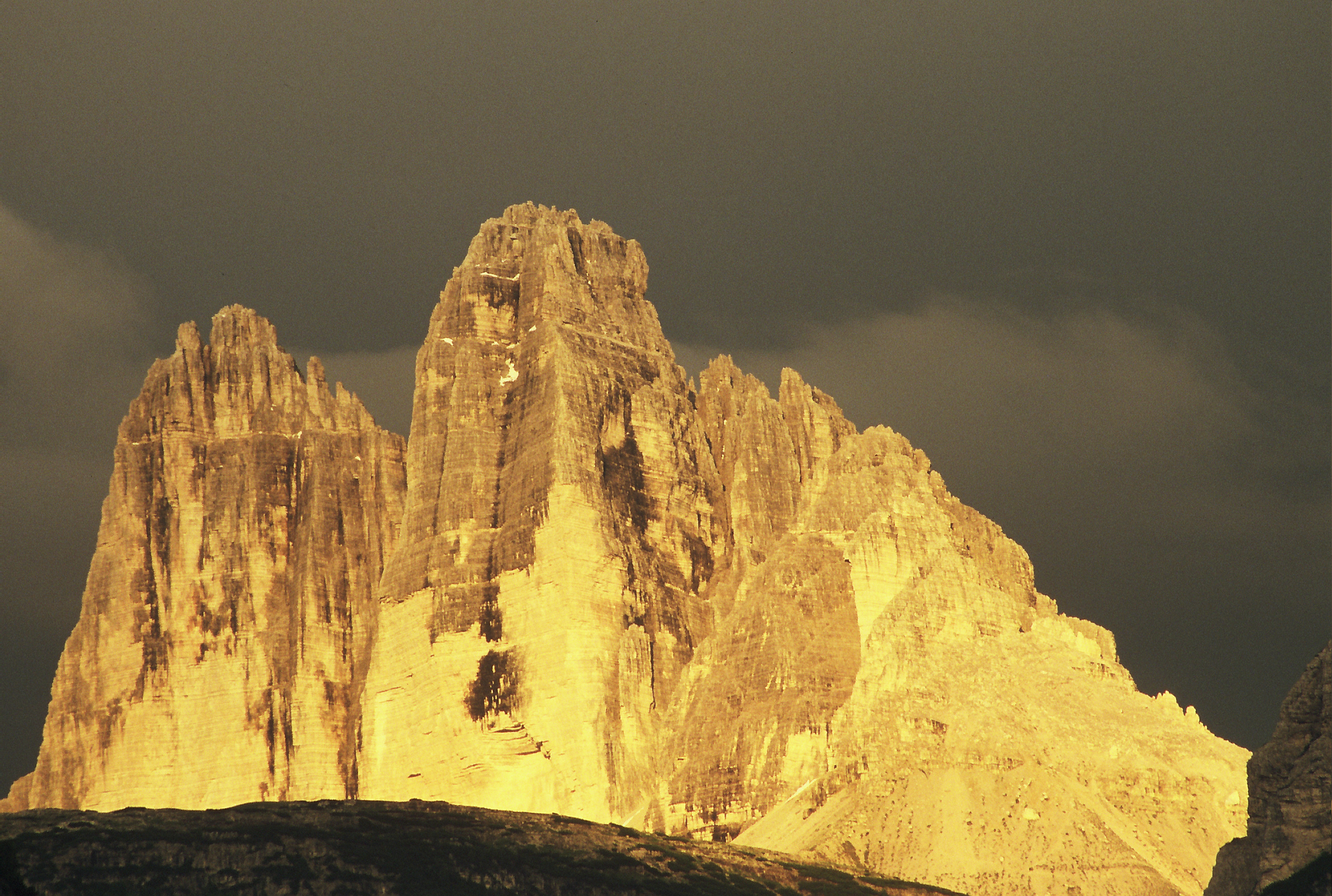 Drei Zinnen im Alpenglühn,aufgenommen durch das Höhlensteintal.